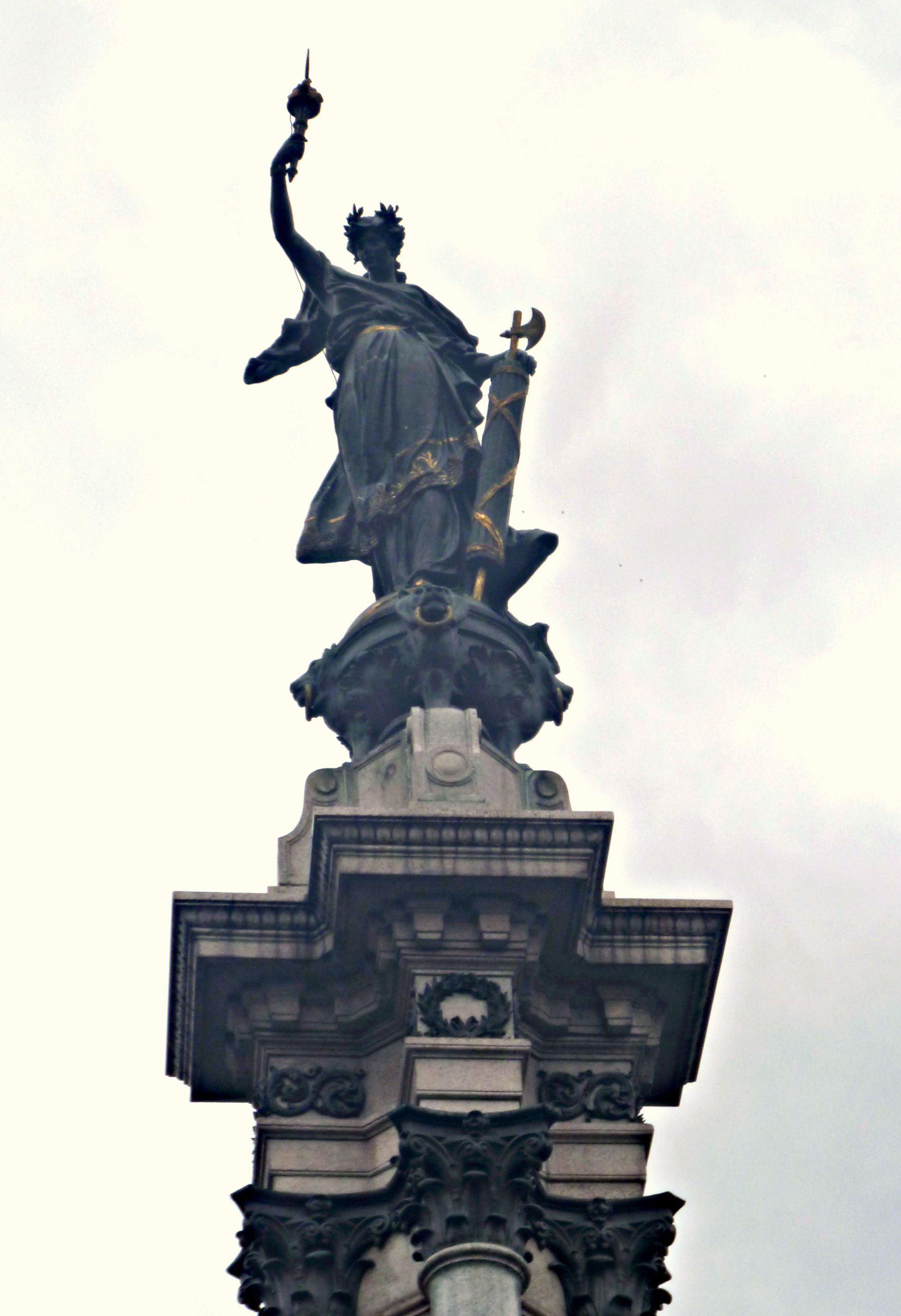 Detalle del conjunto de la parte alta del Monumento a la Independencia, que se levanta en la plaza Grande de Quito (Ecuador). Con las hojas de acanto, el orbe del mundo y la diosa romana Libertas coronando el conjunto.